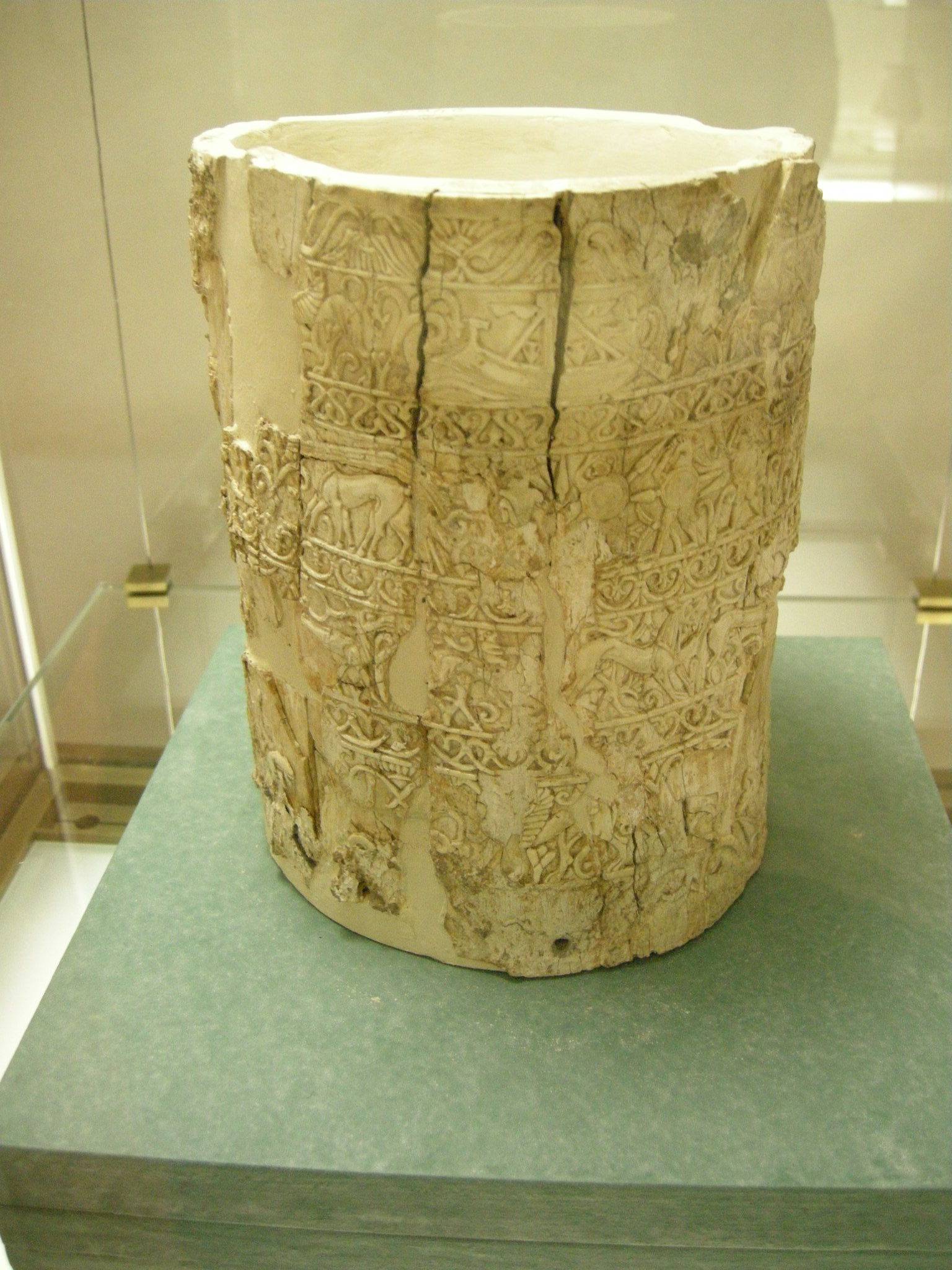 Museo archeologico di Firenze, pisside da Chiusi, terzo quarto del VII sec. a.c.